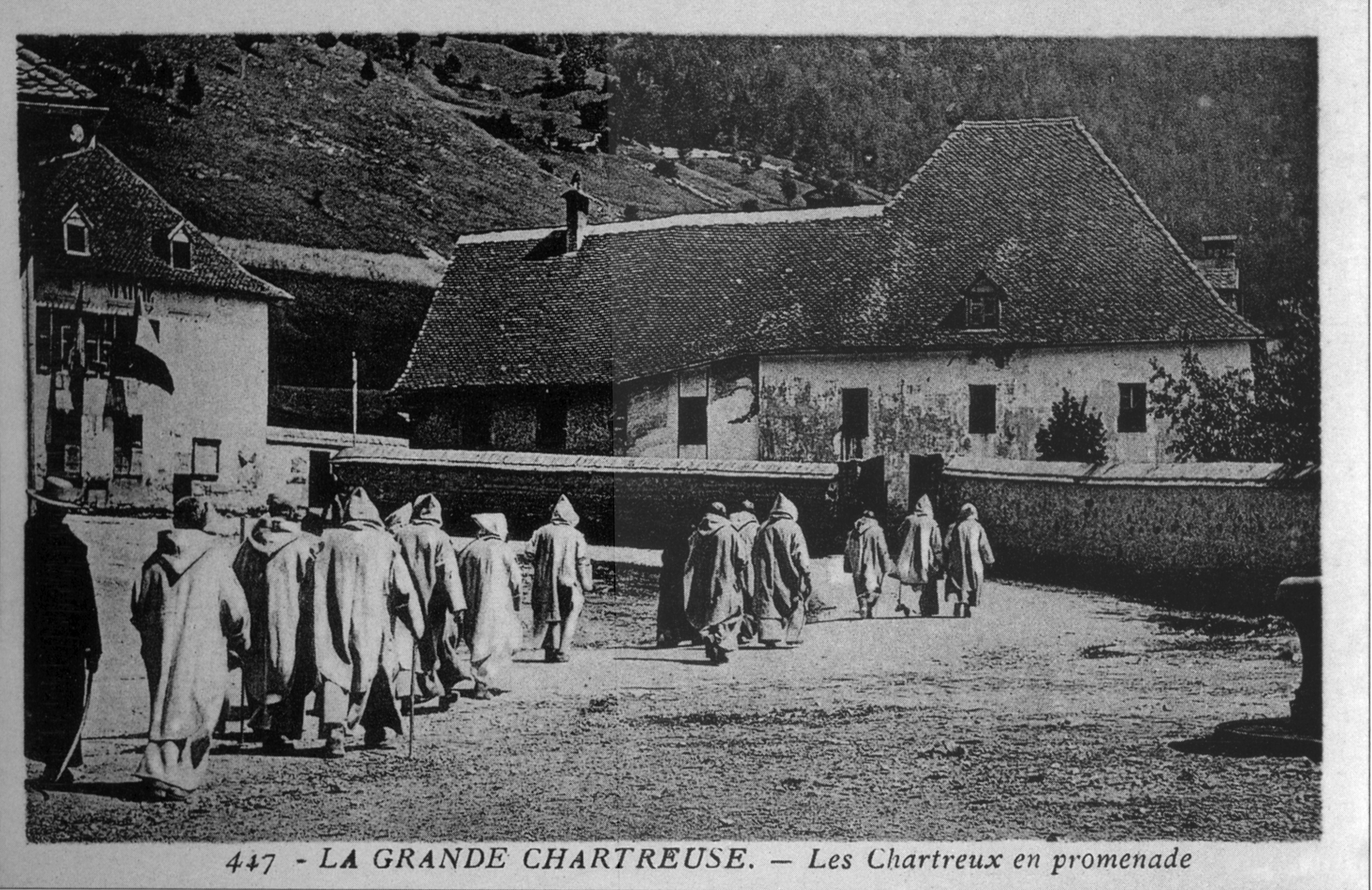 Saint-Pierre-de-Chartreuse, Grande-Chartreuse, les chartreux en promenade.